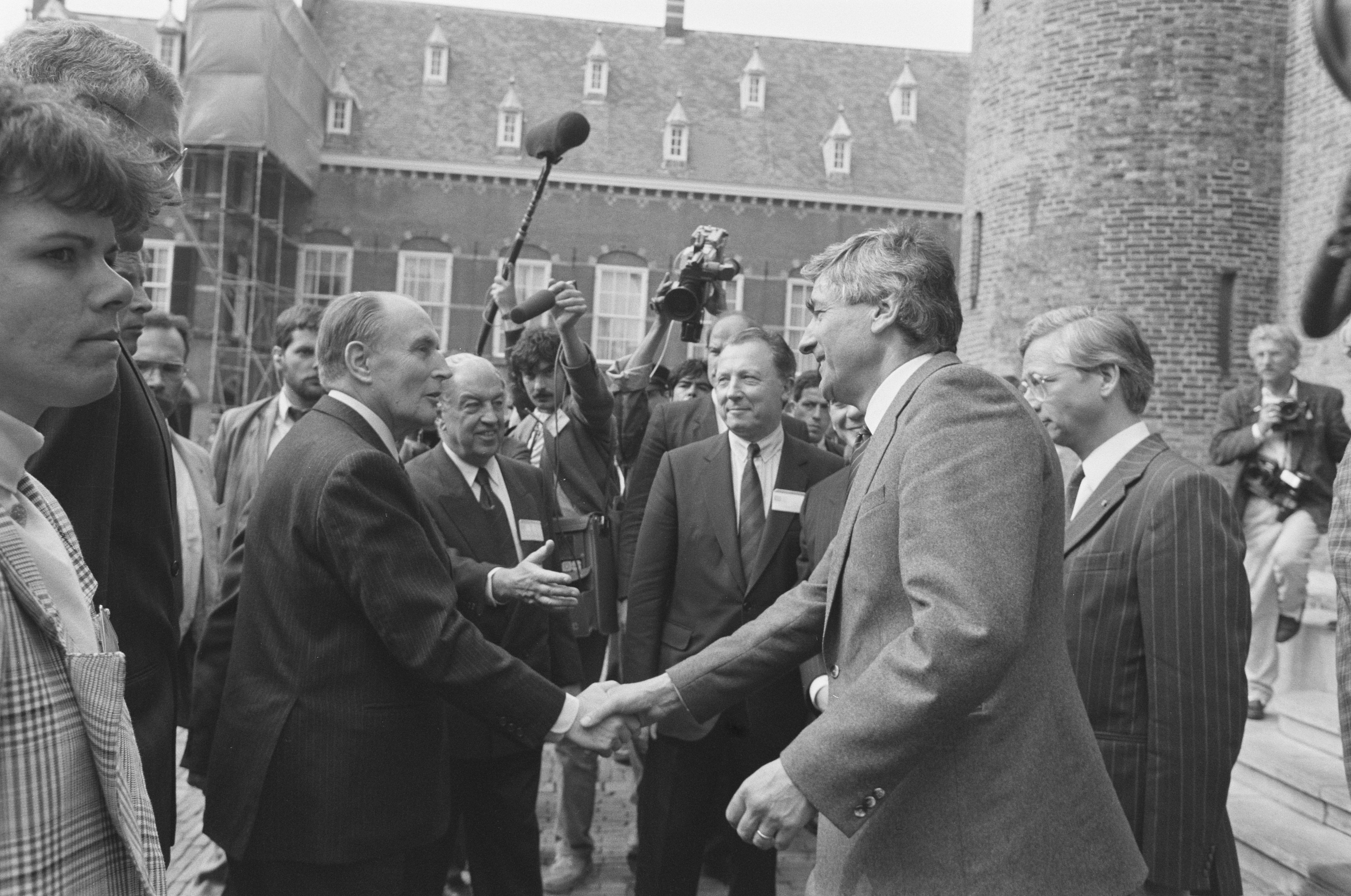 Collectie / Archief : Fotocollectie Anefo Reportage / Serie : [ onbekend ] Beschrijving : President Mitterrand bij slotzitting Europa Congres ; premier Lubbers begroet president Mitterrand bij aankomst Datum : 7 mei 1988 Trefwoorden : AANKOMST, congressen, premiers, presidenten Persoonsnaam : Lubbers, Ruud, Mitterrand, François Fotograaf : Croes, Rob C. / Anefo Auteursrechthebbende : Nationaal Archief Materiaalsoort : Negatief (zwart/wit) Nummer archiefinventaris : bekijk toegang 2.24.01.05 Bestanddeelnummer : 934-2442